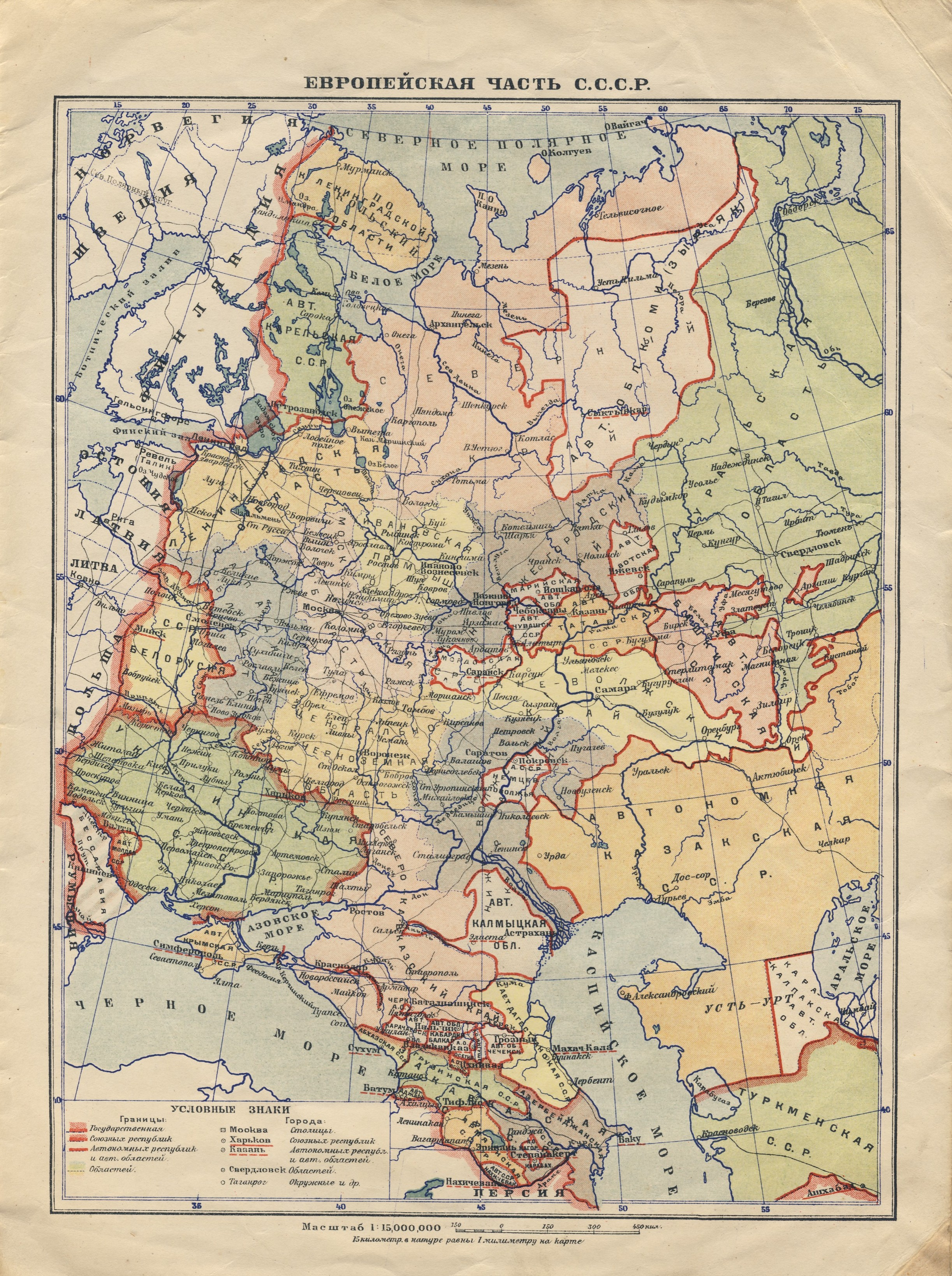 Карта европейской части СССР